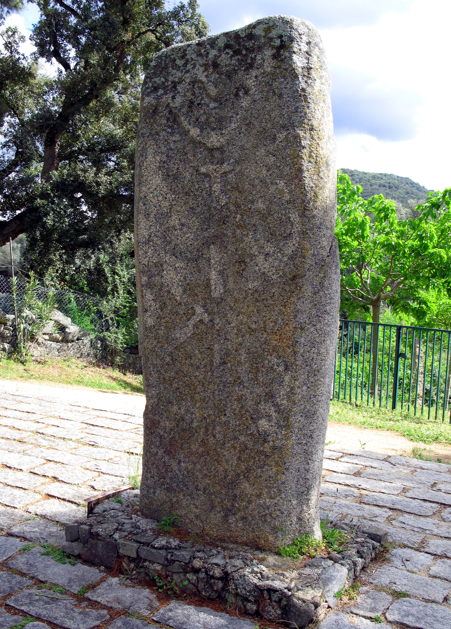 Filitosa (Corse-du-Sud, France) - Statue-menhir nommée "Filitosa V".